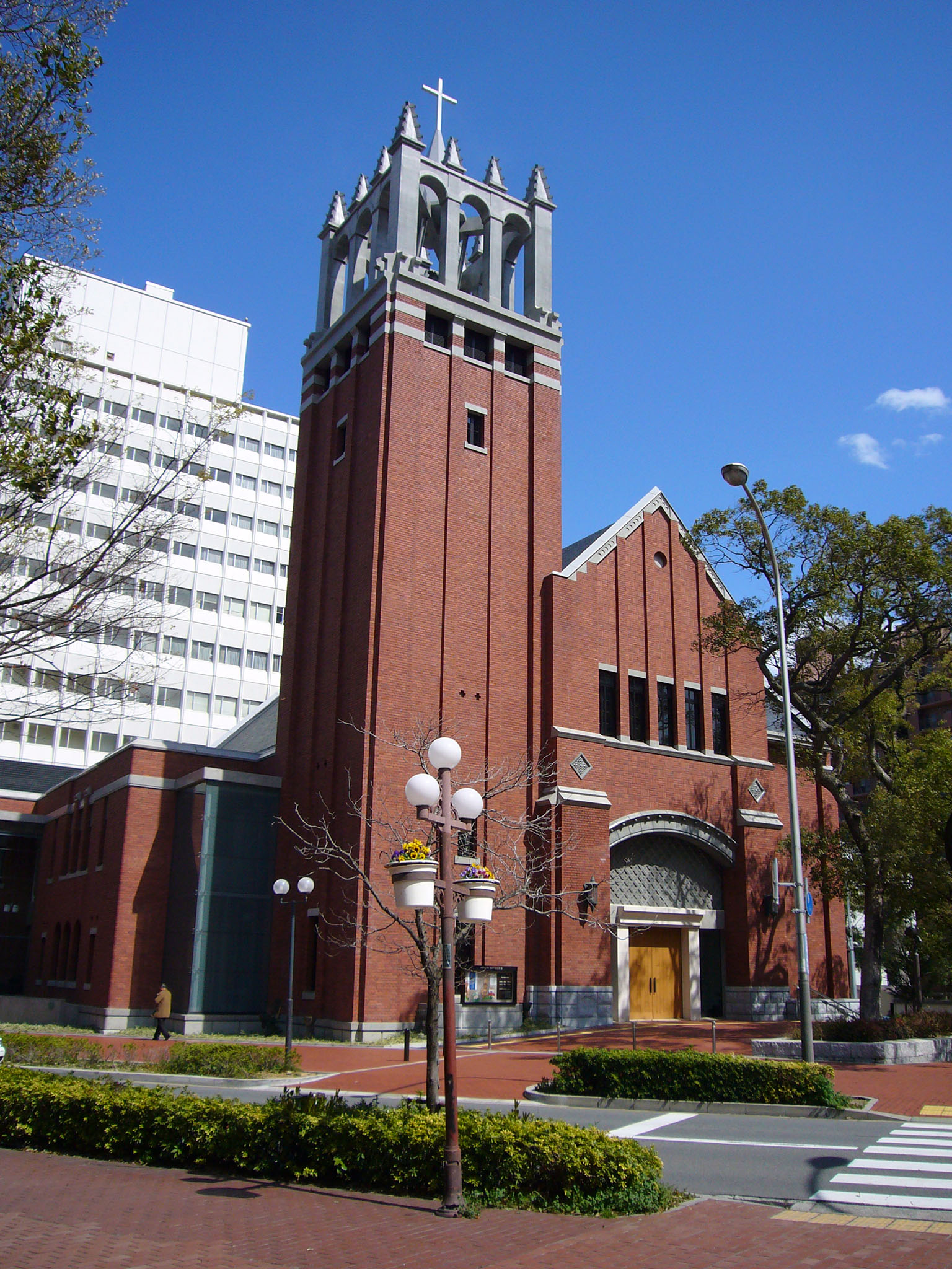 Kobe Eiko Church in Kobe, Japan